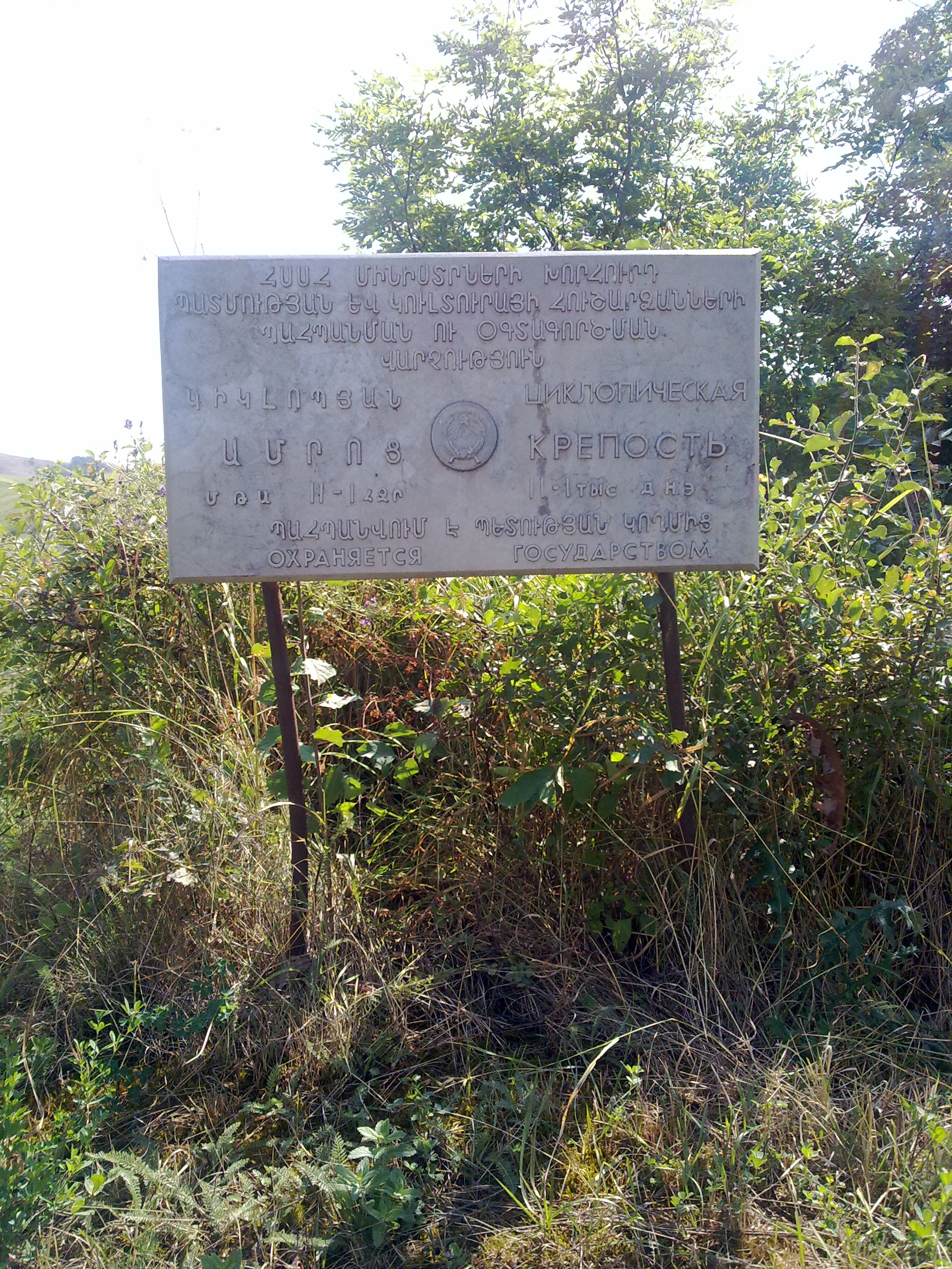 Հայաստանի Հանրապետության Տավուշի մարզի Նորաշեն գյուղում գտնվող կիկլպյան ամրոցի վրա տեղադրված տախտակ, որը վկայում է ամրոցի կառուցման թվի մասին